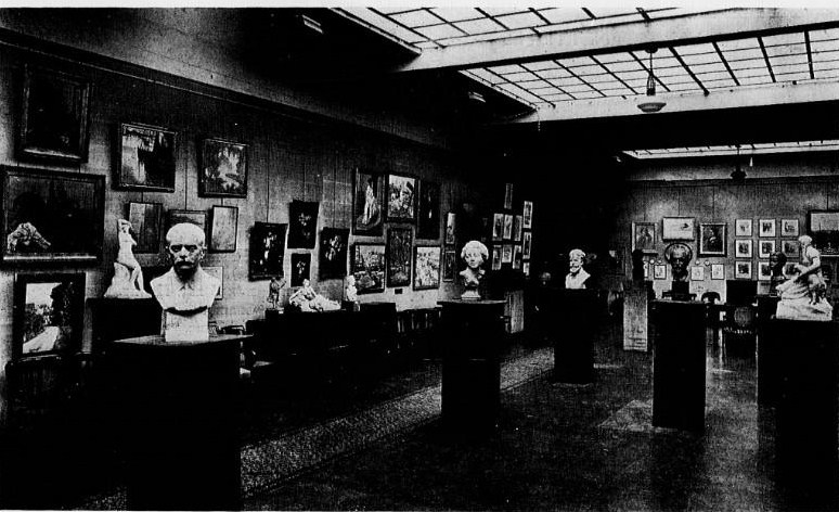 Une exposition d'artistes membres de la goguette du Cornet à la galerie La Boétie à Paris en 1934.